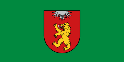 Valkas novada karogs